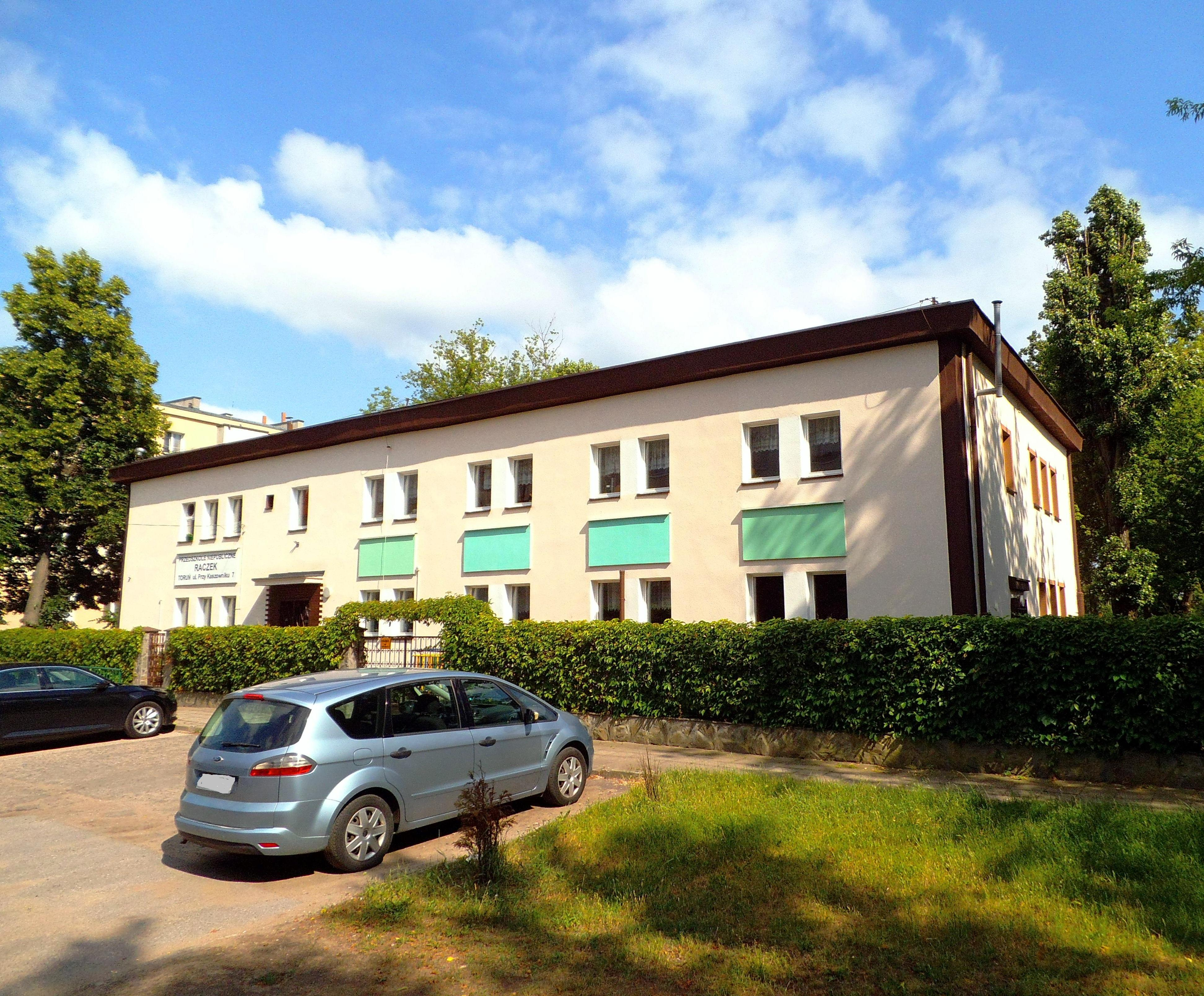 Przedszkole Niepubliczne Raczek w Toruniu